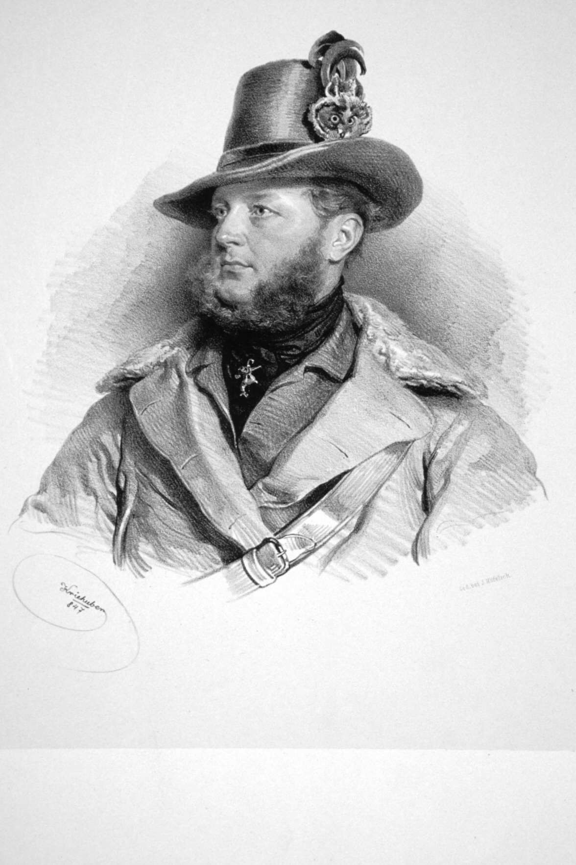 Kazimierz Władysław Starzeński